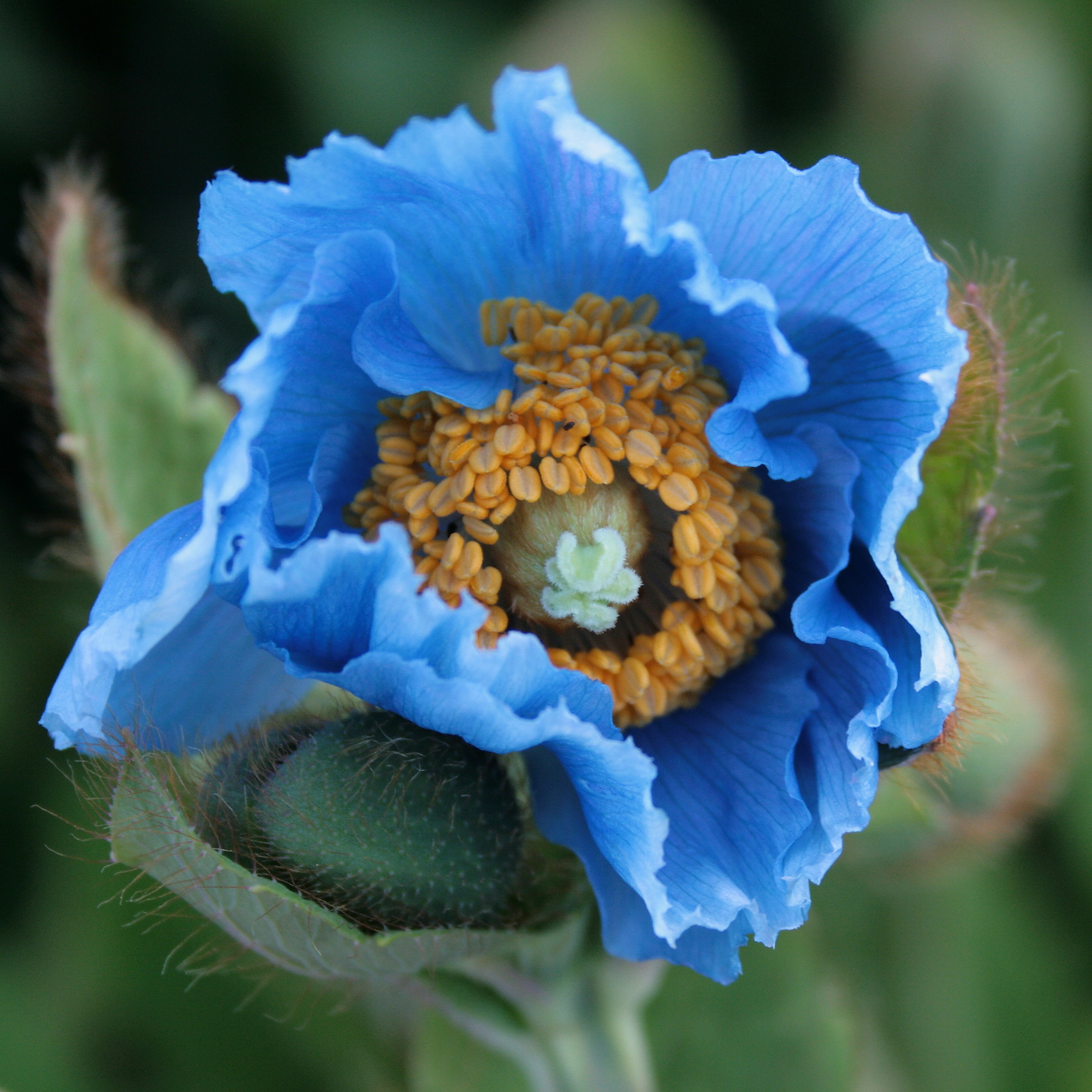 Ísland, Akureyri Botanical Gardens: Mohngewächs: Scheinmohn_(Meconopsis_grandis)